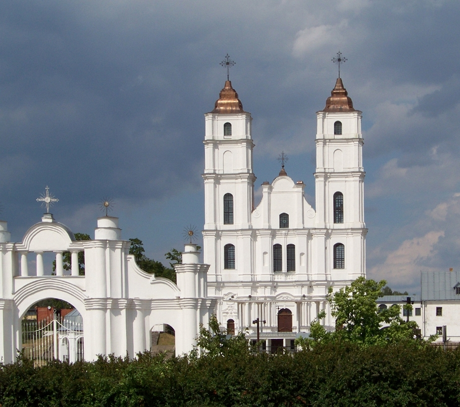 Aglonas bazilika